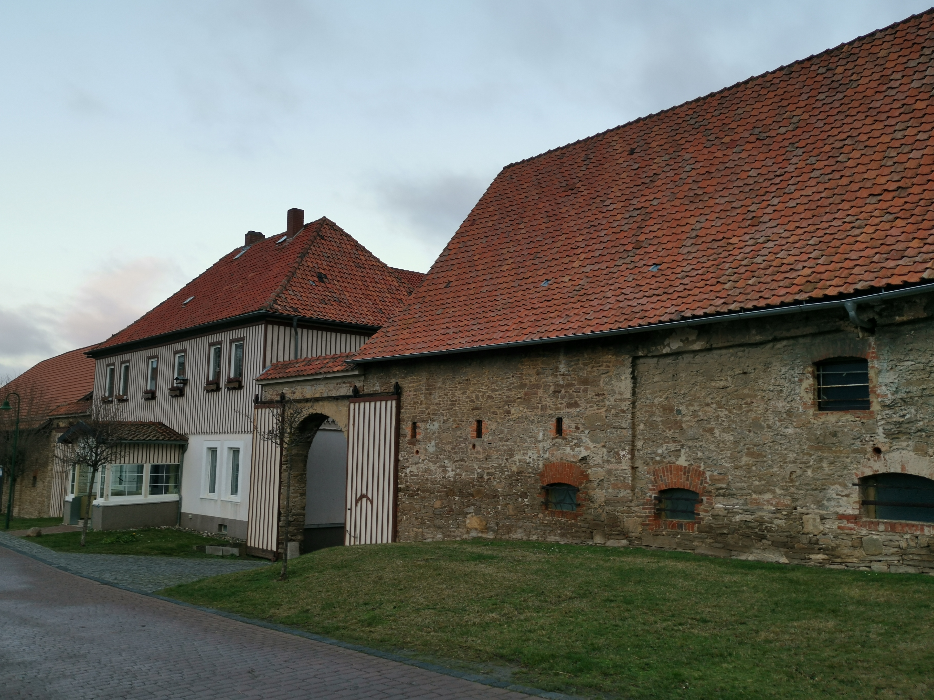 Rittergut Timmenrode